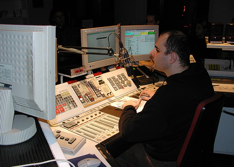 Stefan Scheurer 2001 bei SWR in Baden Baden